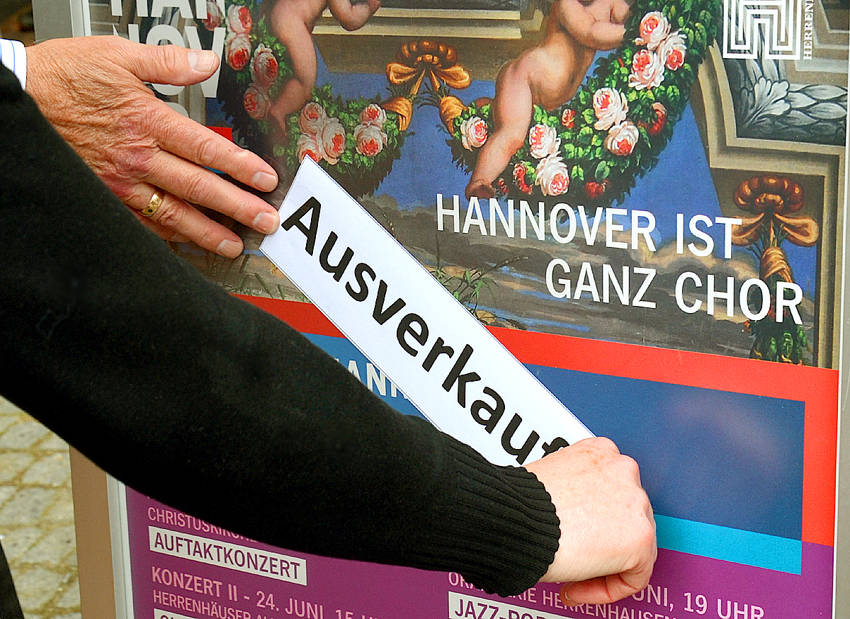 Zeitgleich mit der Fête de la Musique 2015 in Hannover fand in der hannoverschen Christuskirche (Internationales Kinder- und Jugendchorzentrum Christuskirche) das Auftaktkonzert der achttägigen Chortage Hannover 2015 statt. Die Chöre der - ausverkauften - Auftakt-Veranstaltung waren der Mädchenchor Hannover (Konzertchor sowie die Vorklasse und der Nachwuchschor), der Schaumburger Jugendchor sowie der Knabenchor Hannover ...